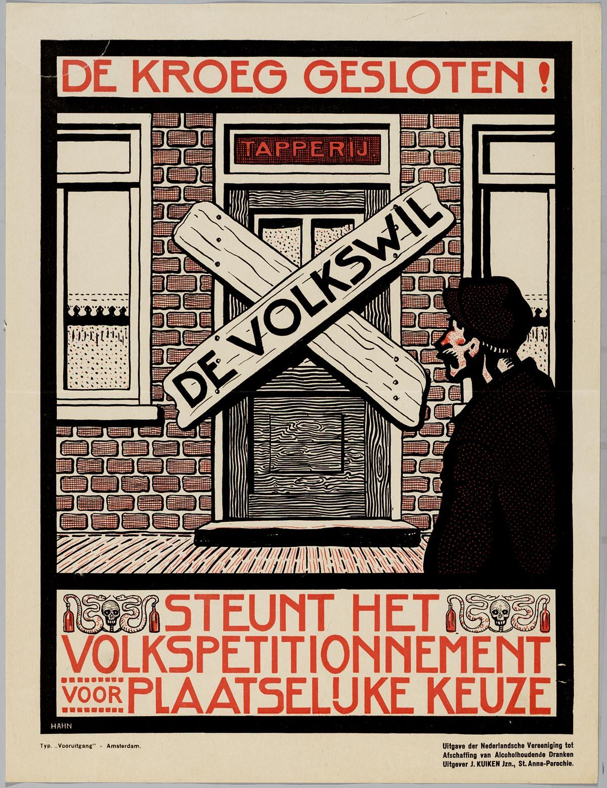 Affiche: De kroeg gesloten. Uitgever: J. Kuiken Jzn. Nederlandsche Vereeniging tot Afschaffing van Alcoholhoudende Dranken